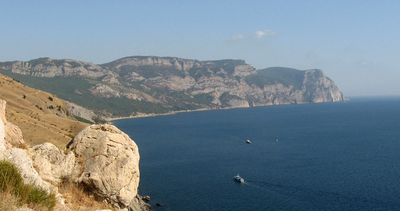 Мыс Айя, Крым